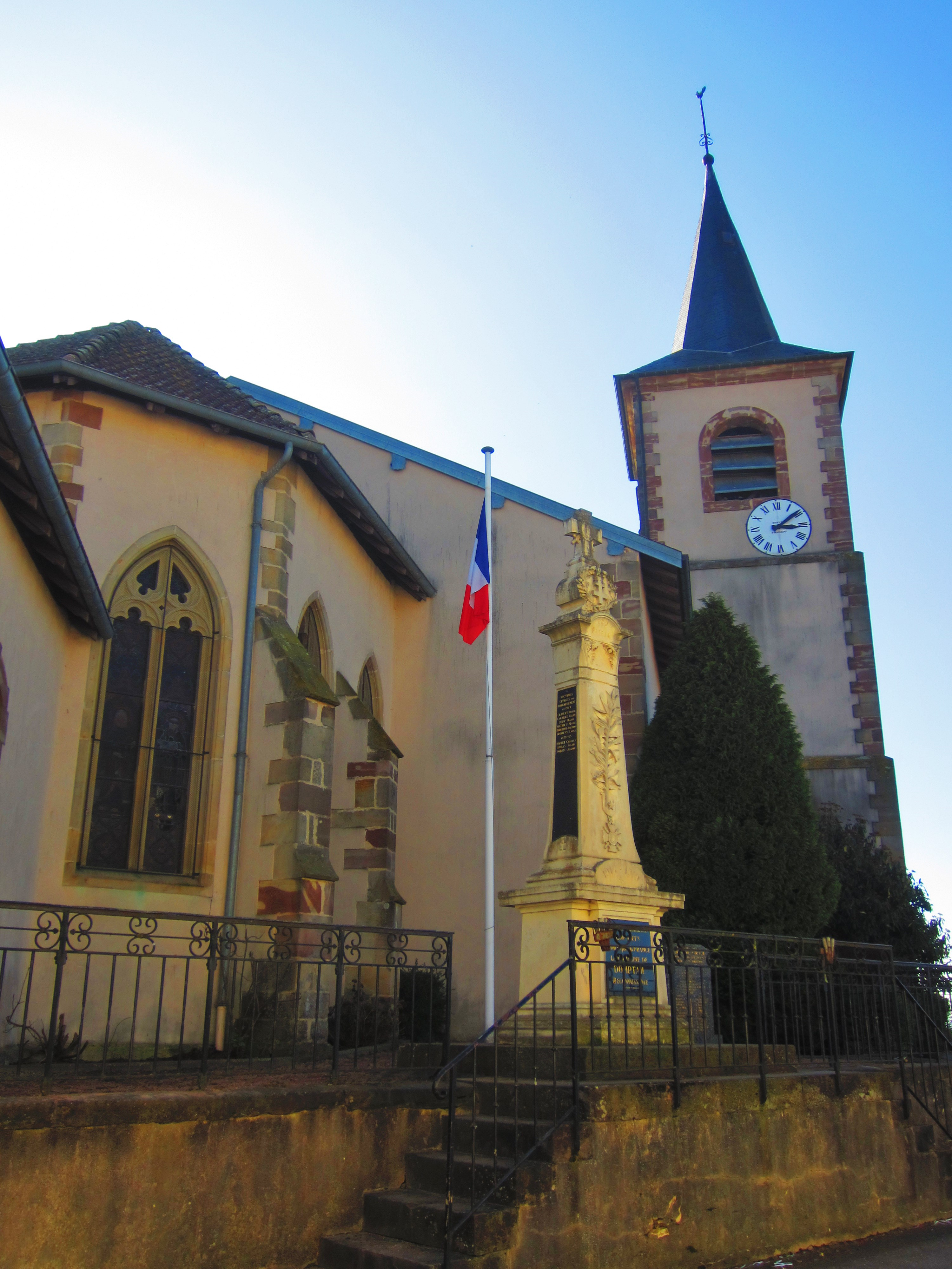 L'église Sainte-Céline à Domptail